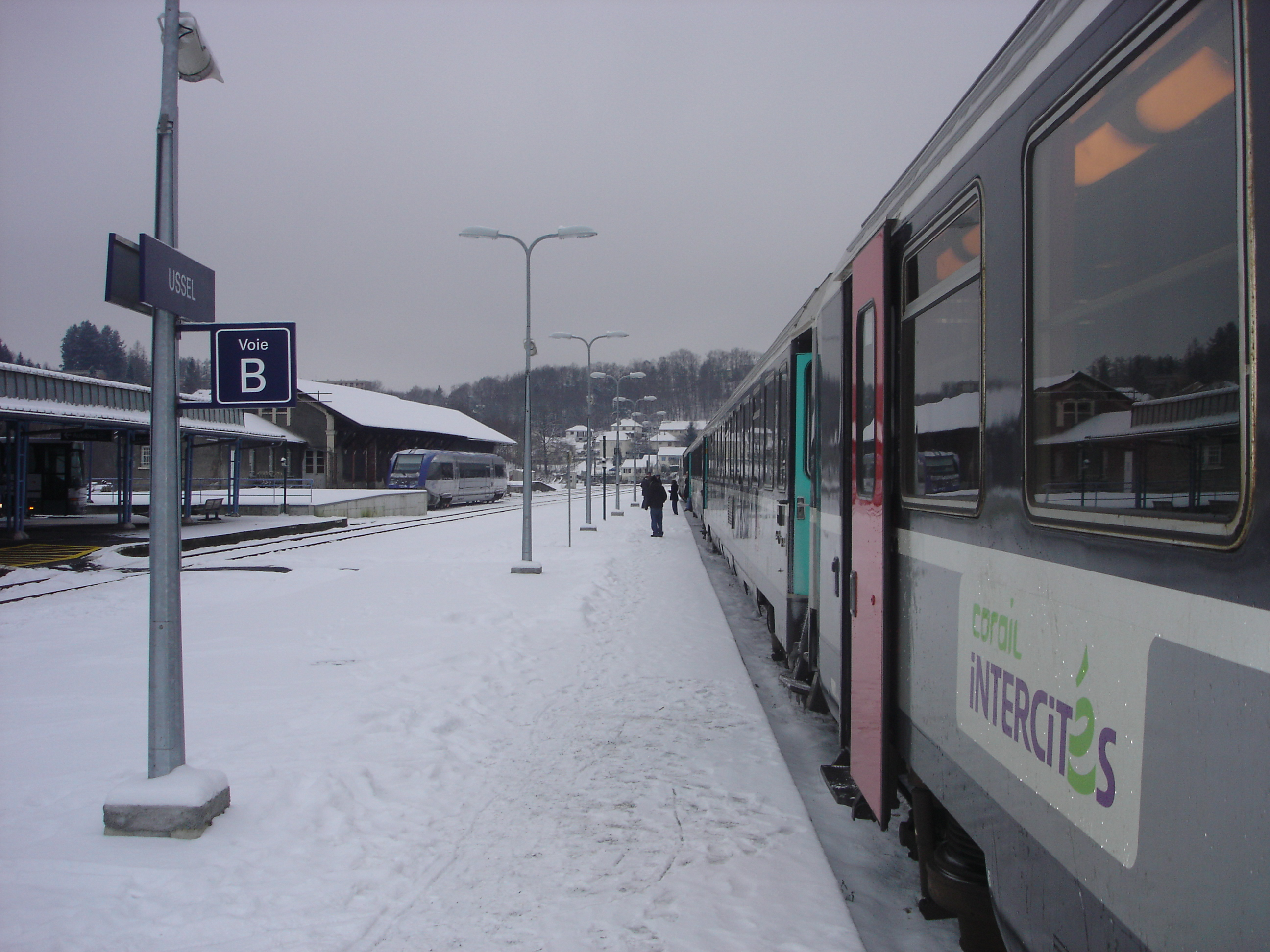 Corail Intercités assurant la liaison Clermont-Ferrand - Bordeaux, à l'arrêt en gare d'Ussel